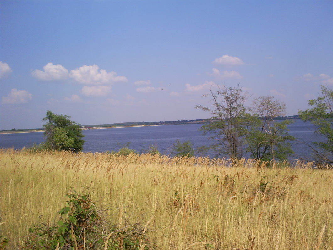 Вештачко језеро Језиорско. Поглед са централног дела острва на другу обалу. (Пољска) 25.07.2006. Author:Jovan Vuković If you need this picture with biger rezolution ask me there.